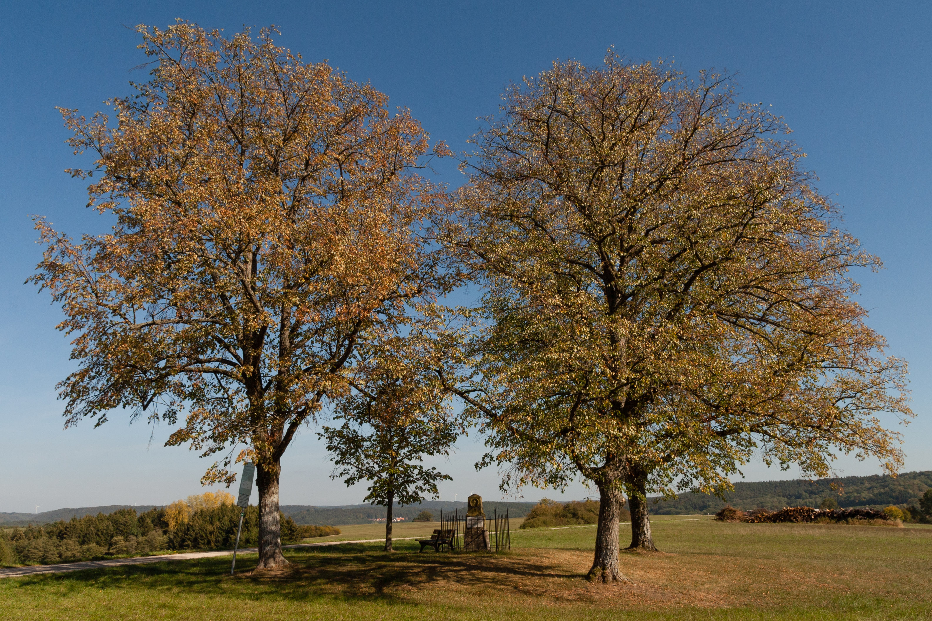 Burgthann, Dörlbach, Kriegerdenkmal Dörlbacher Au, Vier Friedenslinden